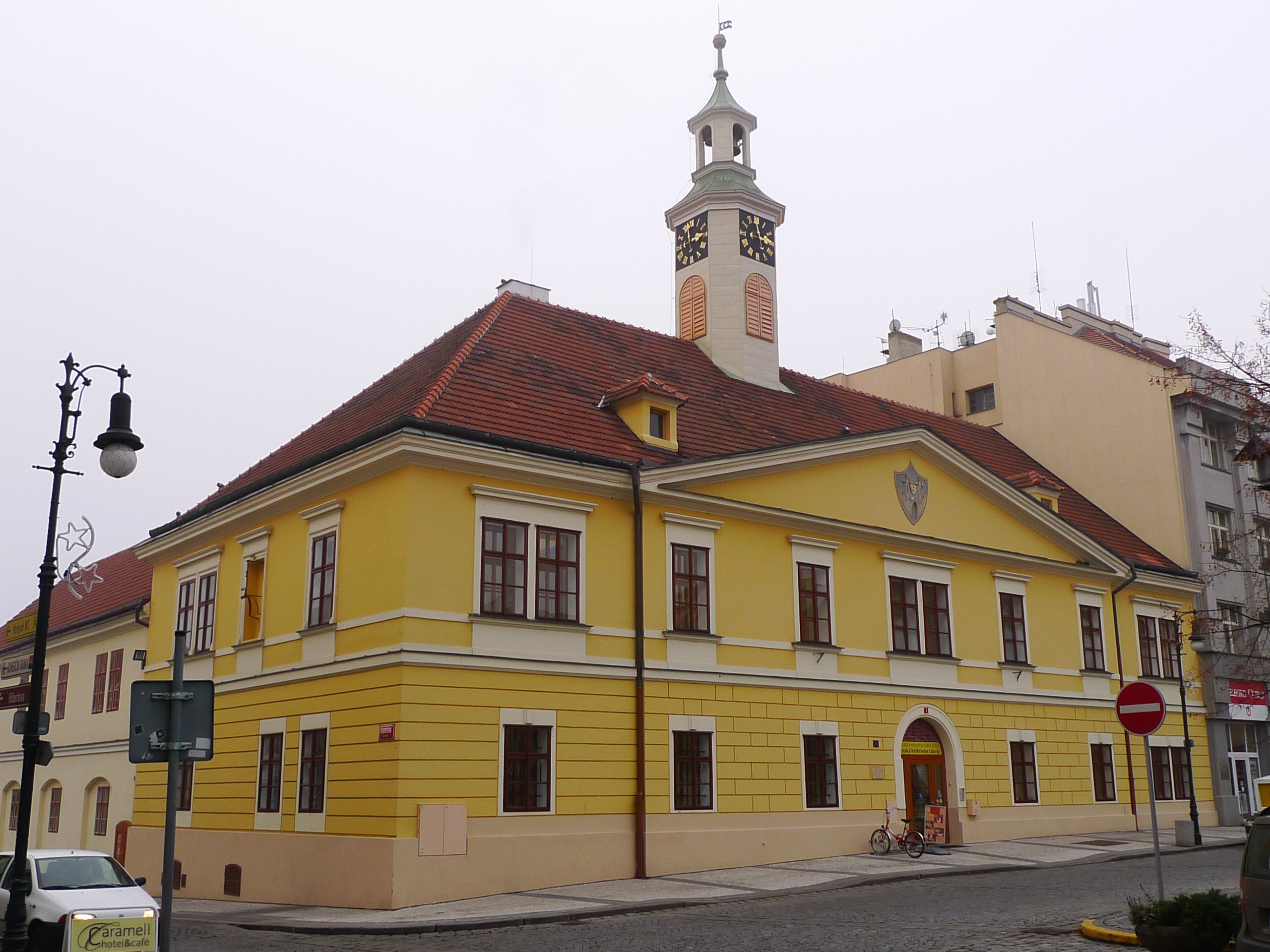 Radnice (Louny), Mírové nám. 1, Louny